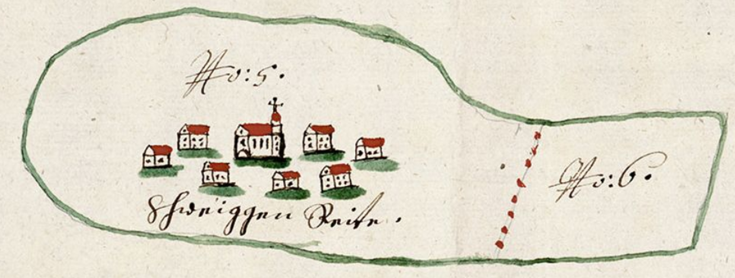 Deutschland (D) - Baden-Württemberg (BW) - Landkreis Konstanz (KN) - Mühlingen: Schwackenreute in einer Karte von 1760 (Ausschnitt)